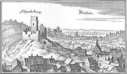 Schwabsburg und Nierstein (Rheinhessen) Kupferstich nach Merian